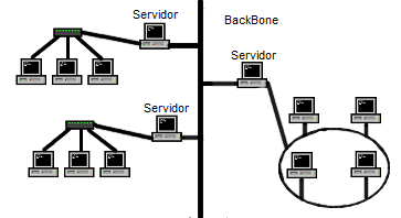 Backbone